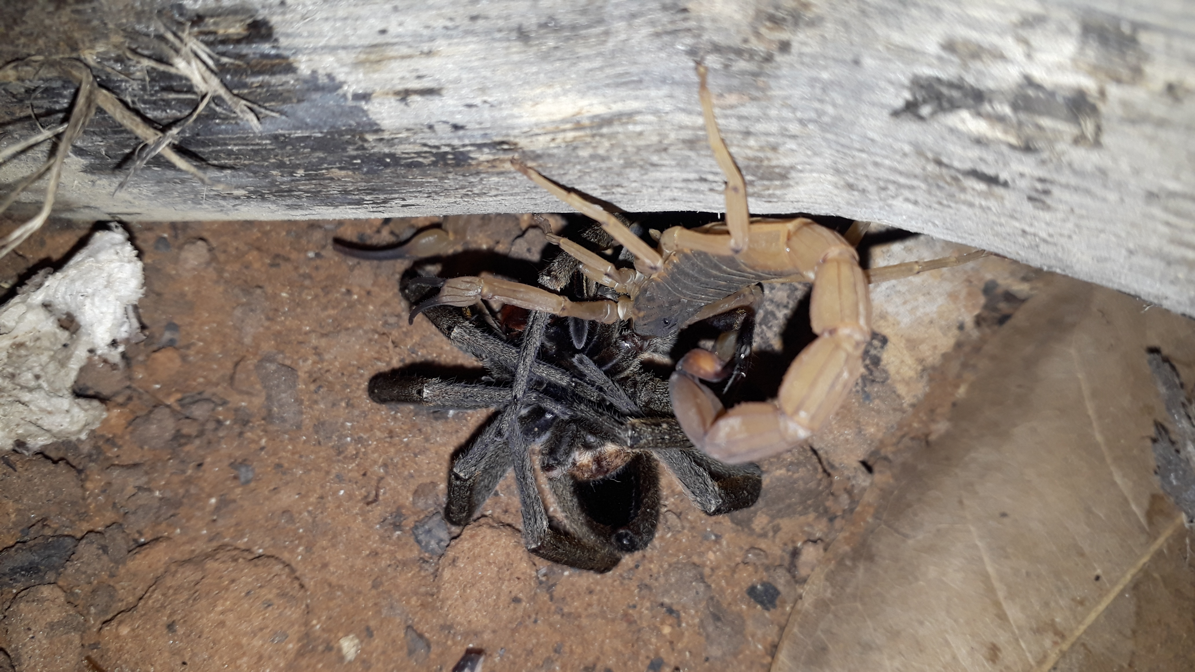 Escorpião amarelo(Tityus serrulatus) comendo uma aranha armadeira(Phoneutria spp)